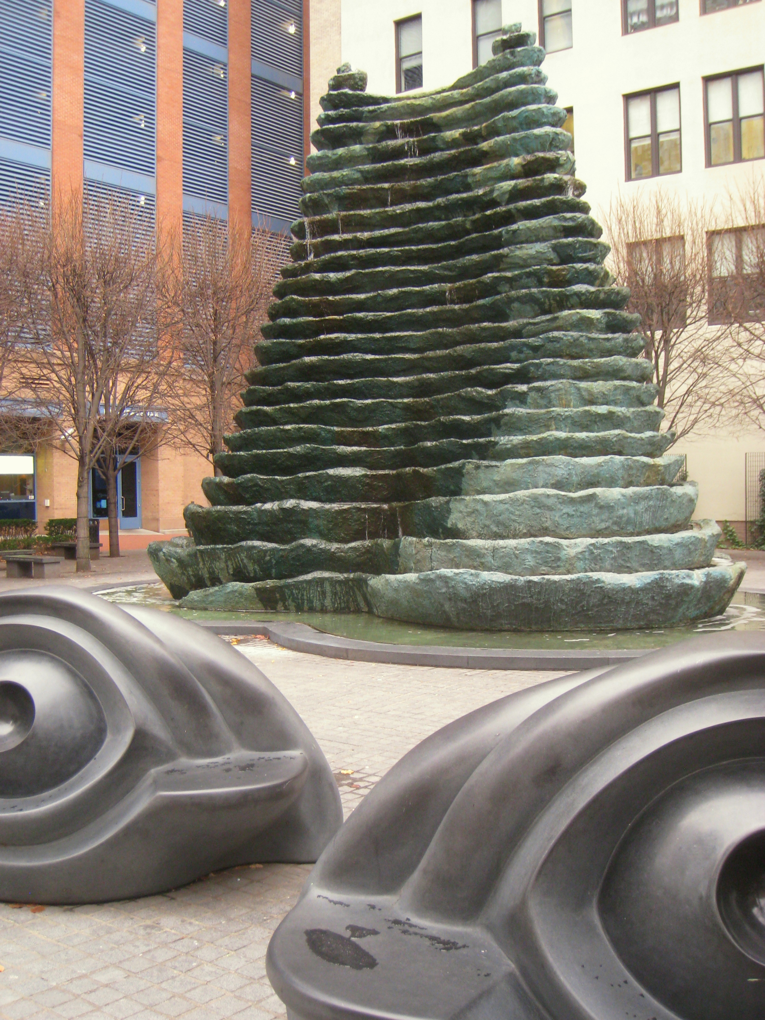 Agnes R. Katz Plaza, Pittsburgh, Pennsylvania, USA.